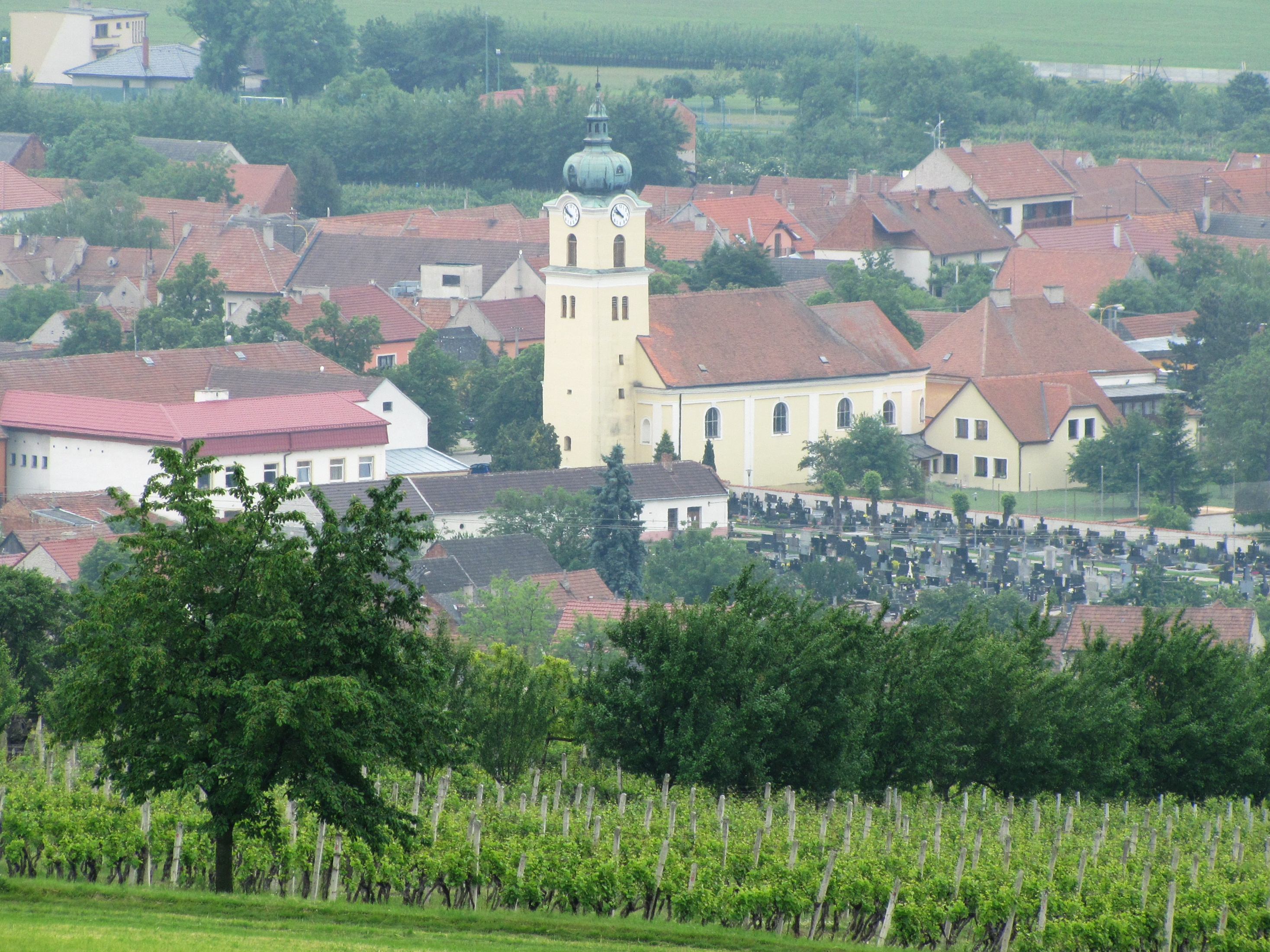 Farní kostel sv. Ondřeje v Blatnici pod Svatým Antonínkem